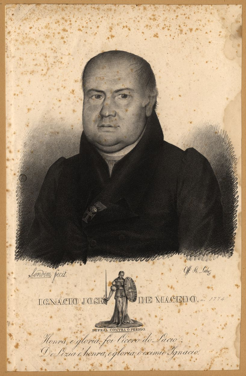 Lithographie mit dem Portrait des portuisieschen Geistlichen und späteren Journalisten Ignacio José de Macedo (1774-1834).